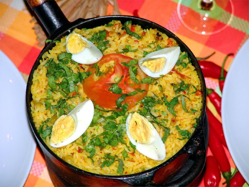 Galinhada.